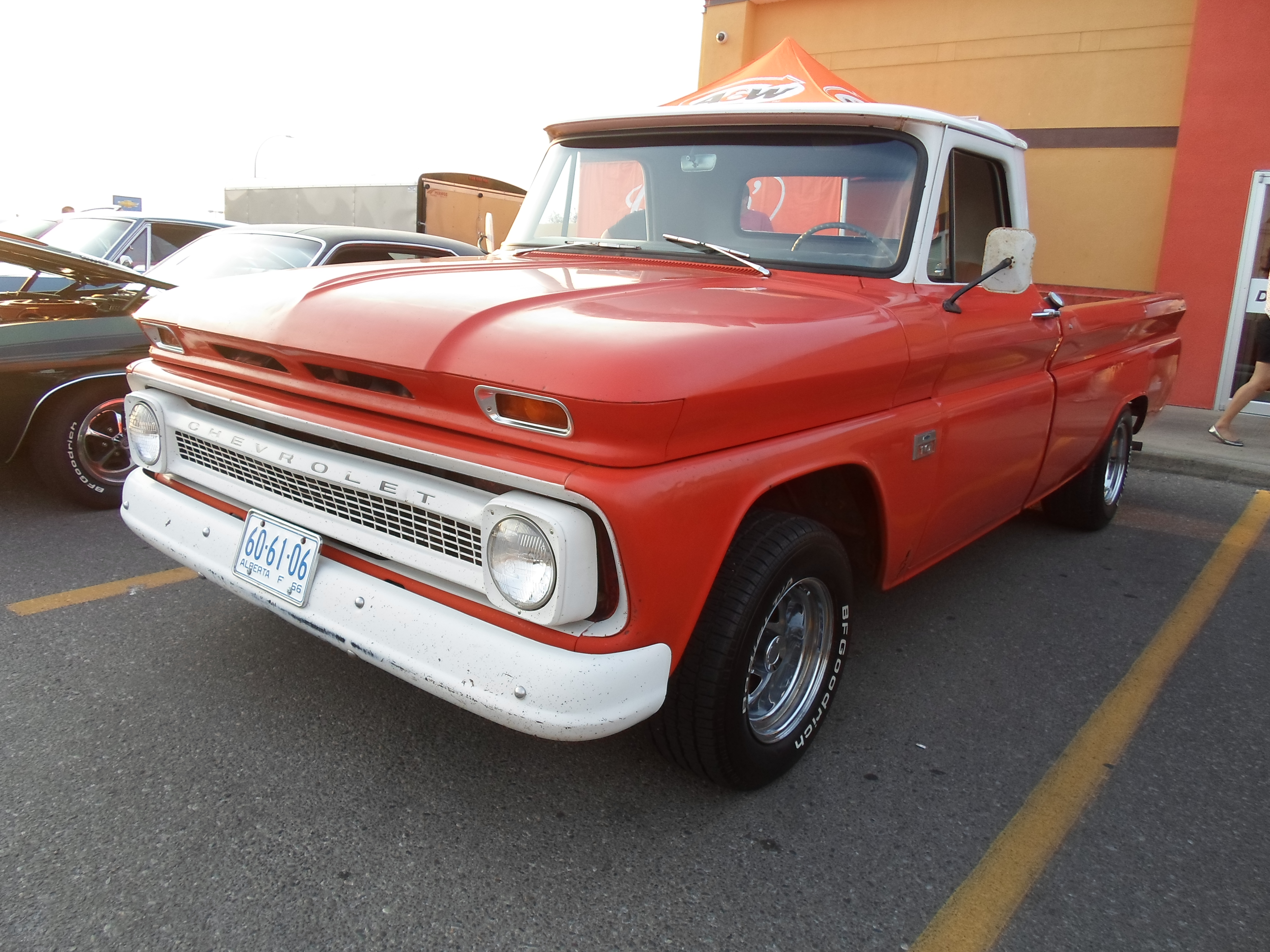 1966 Chevrolet C10 pickup truck